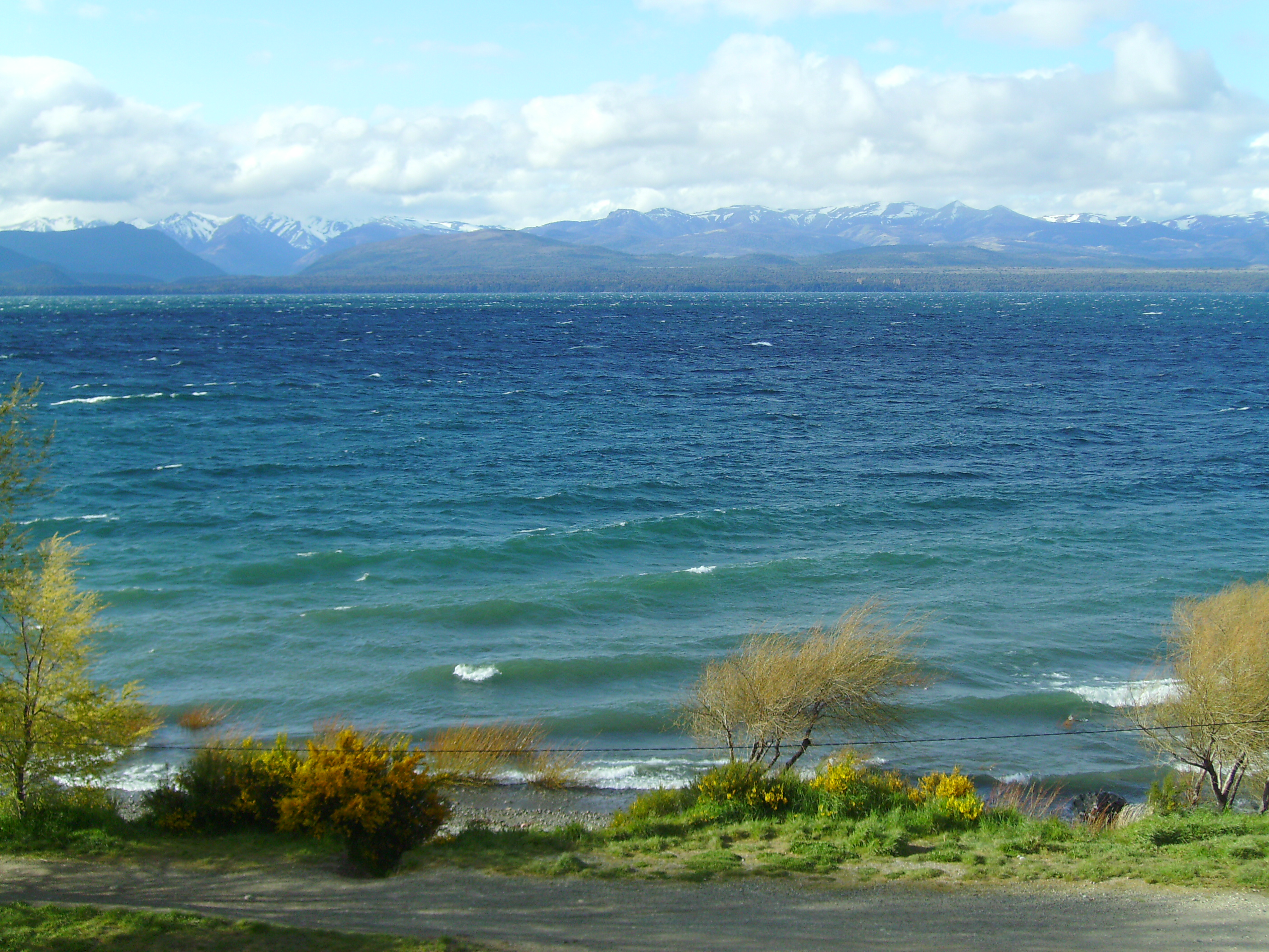 lago Nahuel Huapi - Bariloche